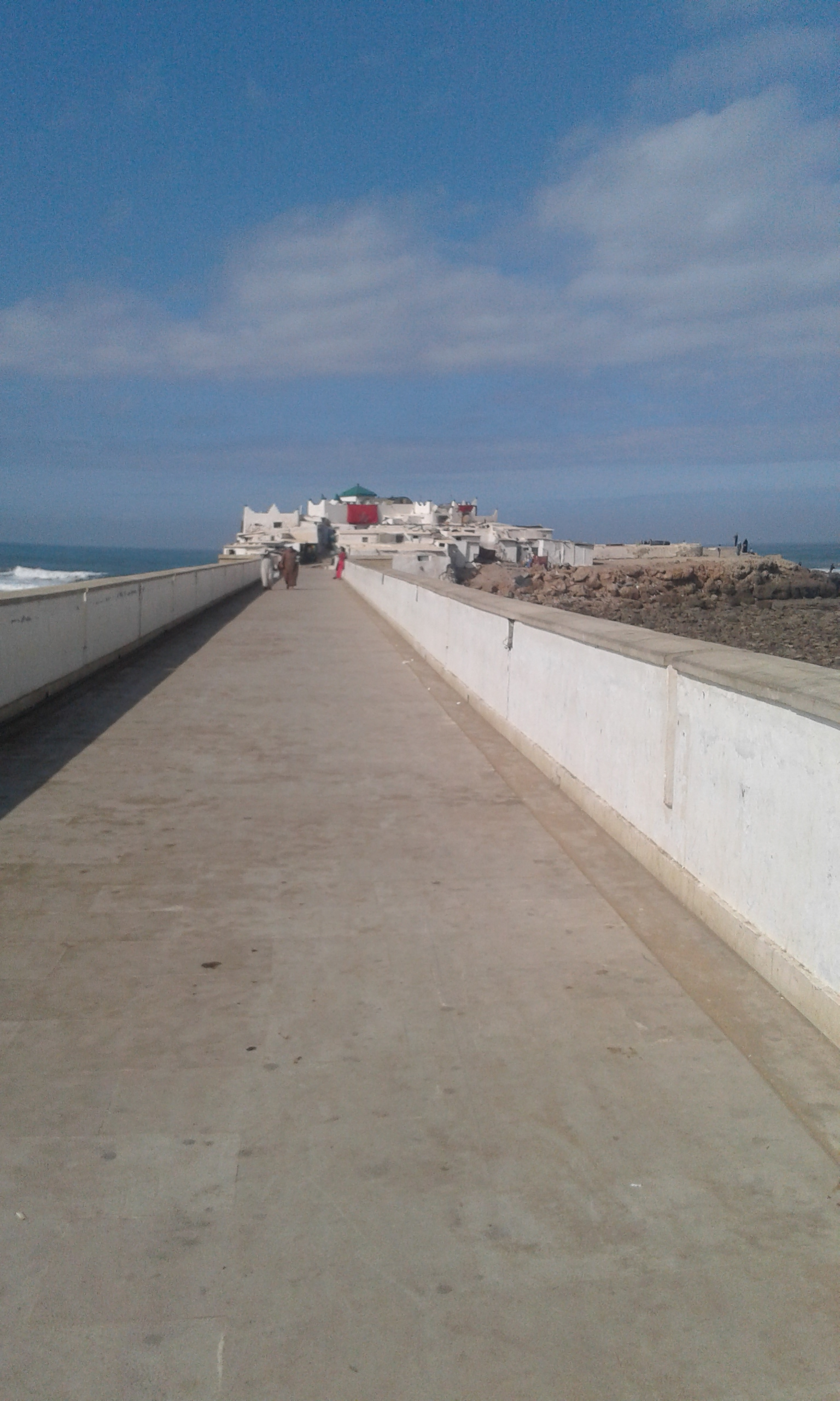 قنطرة شاطئ سيدي عبد الرحمان بالدار البيضاء المغرب من تصوير سعيد الجمالي للتواصل معي